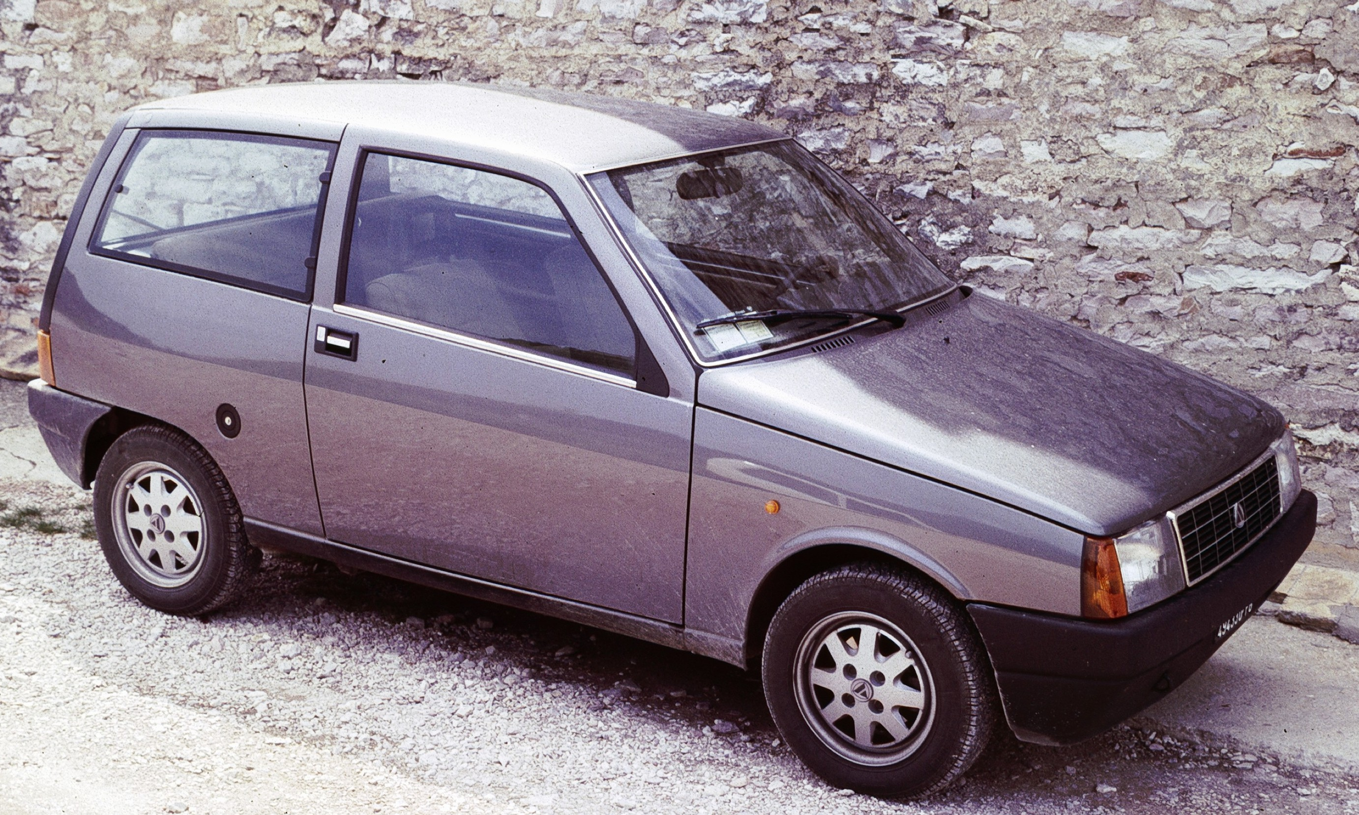 Autobianchi Y10 in Rome